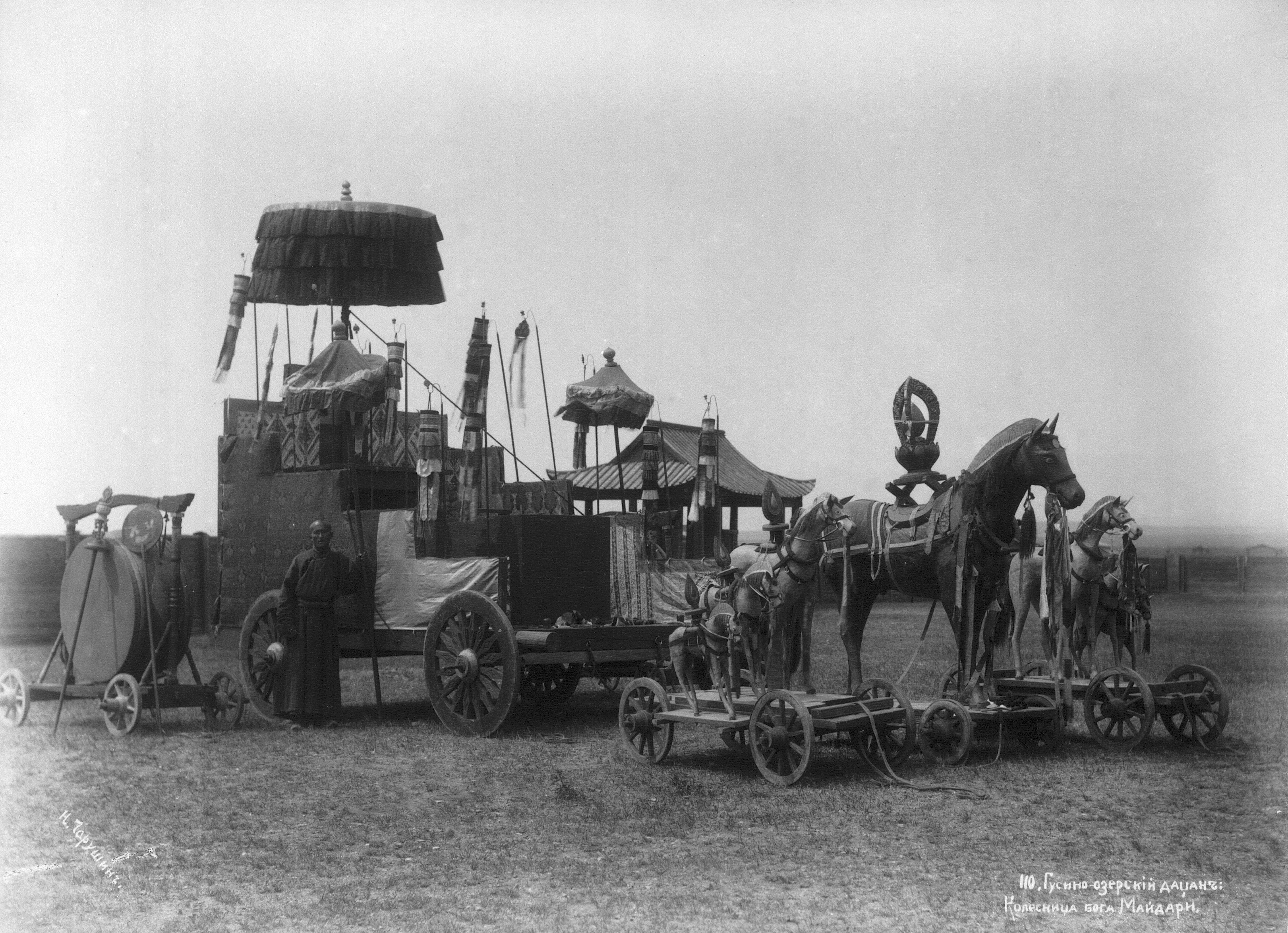 Колесница Майдари. Буддийский праздник.